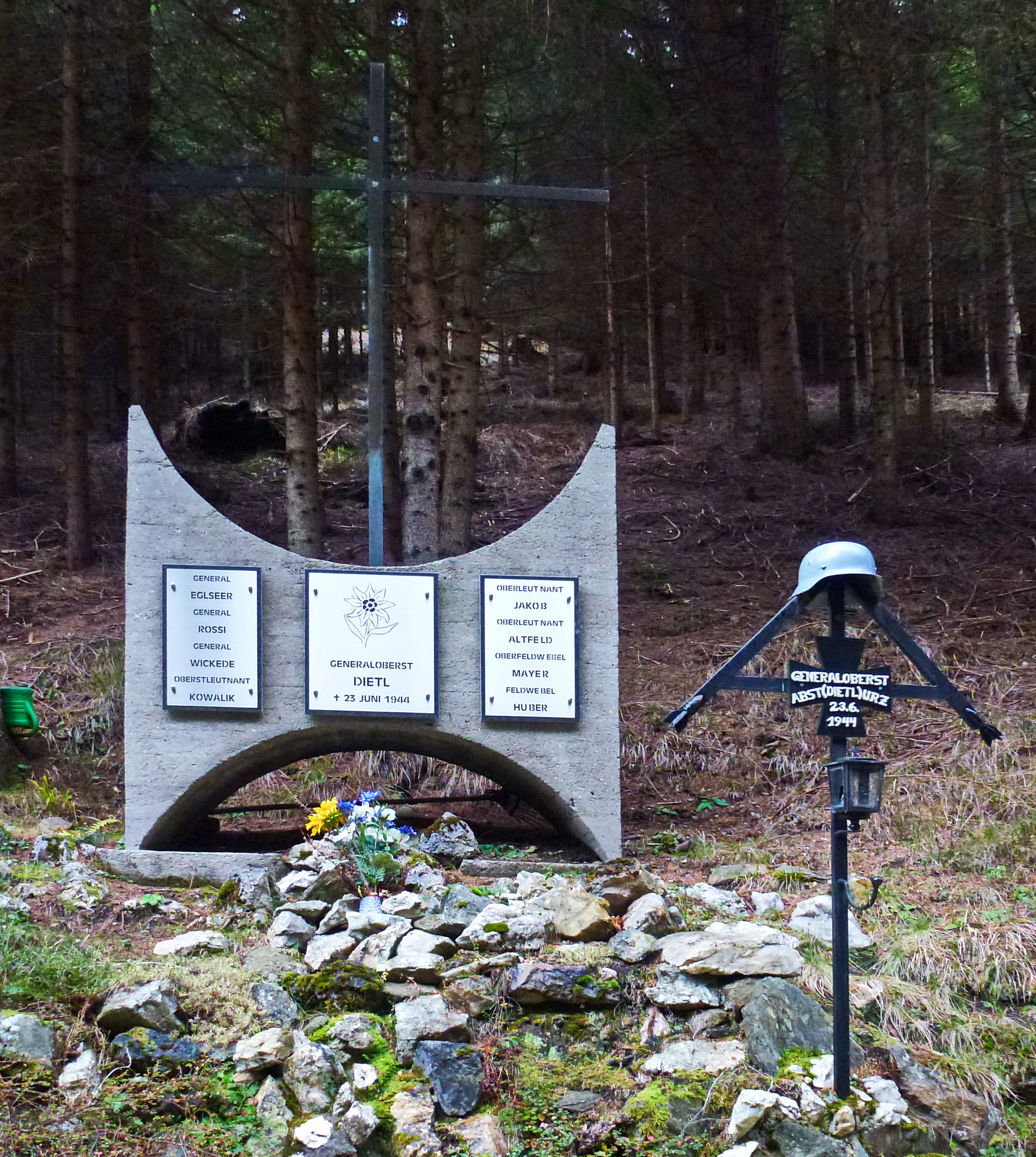 Denkmal "Dietler Kreuz"